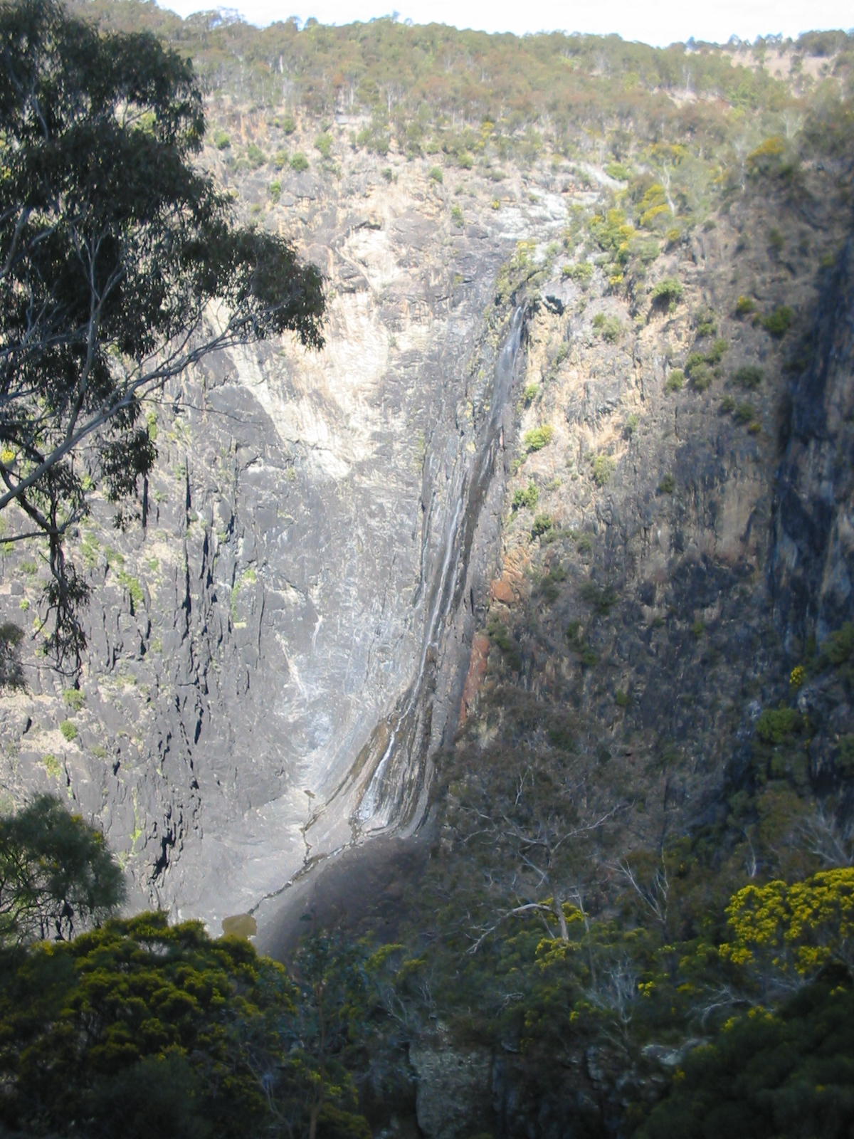 Dangar Falls, Armidale, NSW